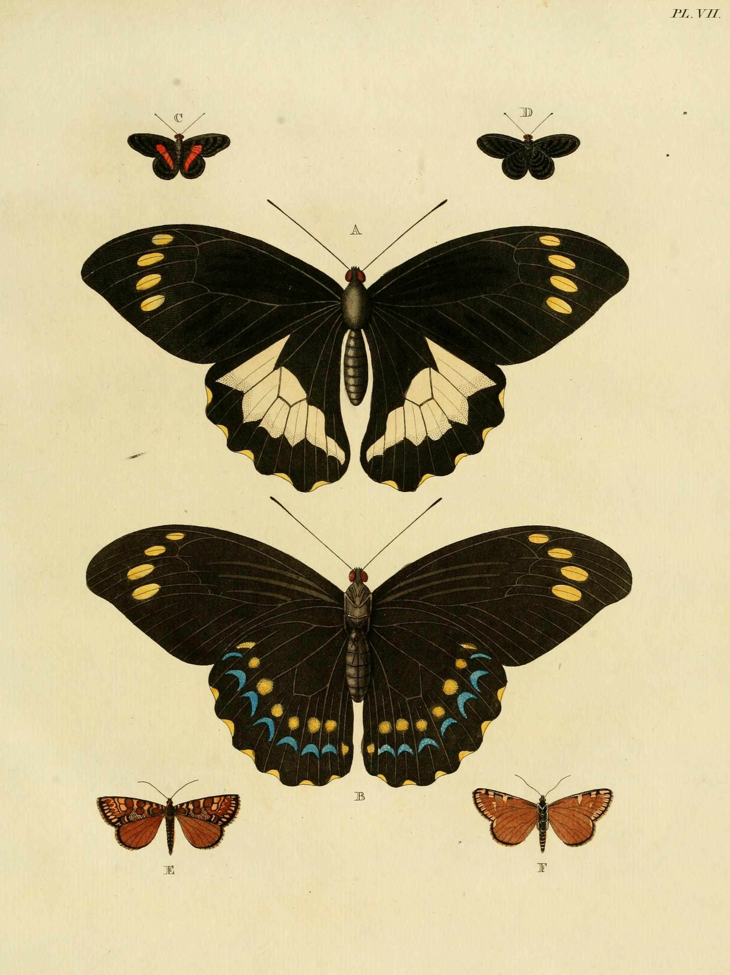 Plate VII A, B "(Papilio) Amphitrion" ( = Papilio gambrisius, see Funet ) C, D: "(Papilio) Pygmea" ( = ?Phaenochitonia tale (Hübner, [1819]), see Funet or Phaenochitonia talus (Cramer, 1775), see NHM, Global Lepidoptera Names Index). E, F: "(Phalaena) Julia" ( = Brephos decora, see Funet